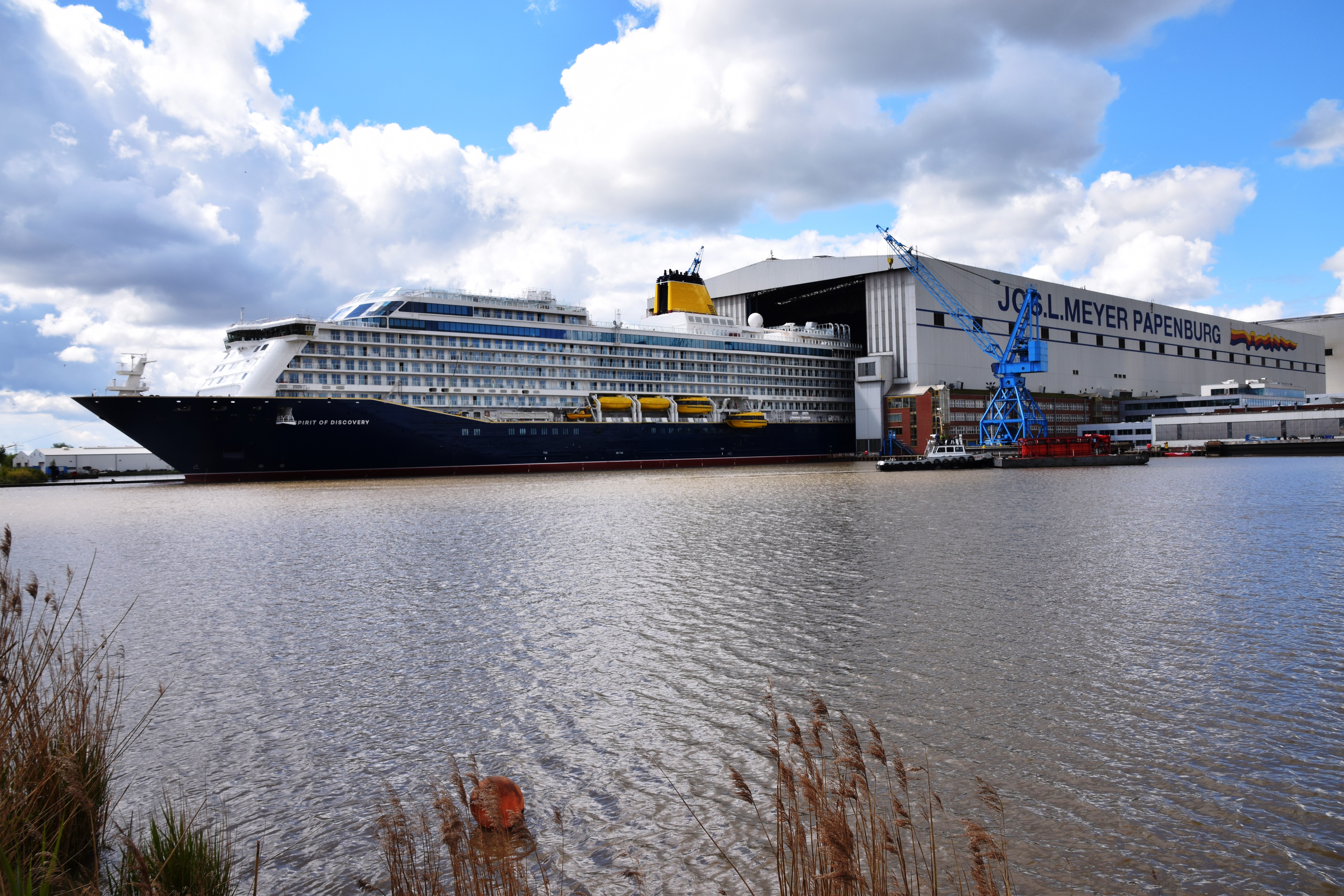 Spirit of Discovery